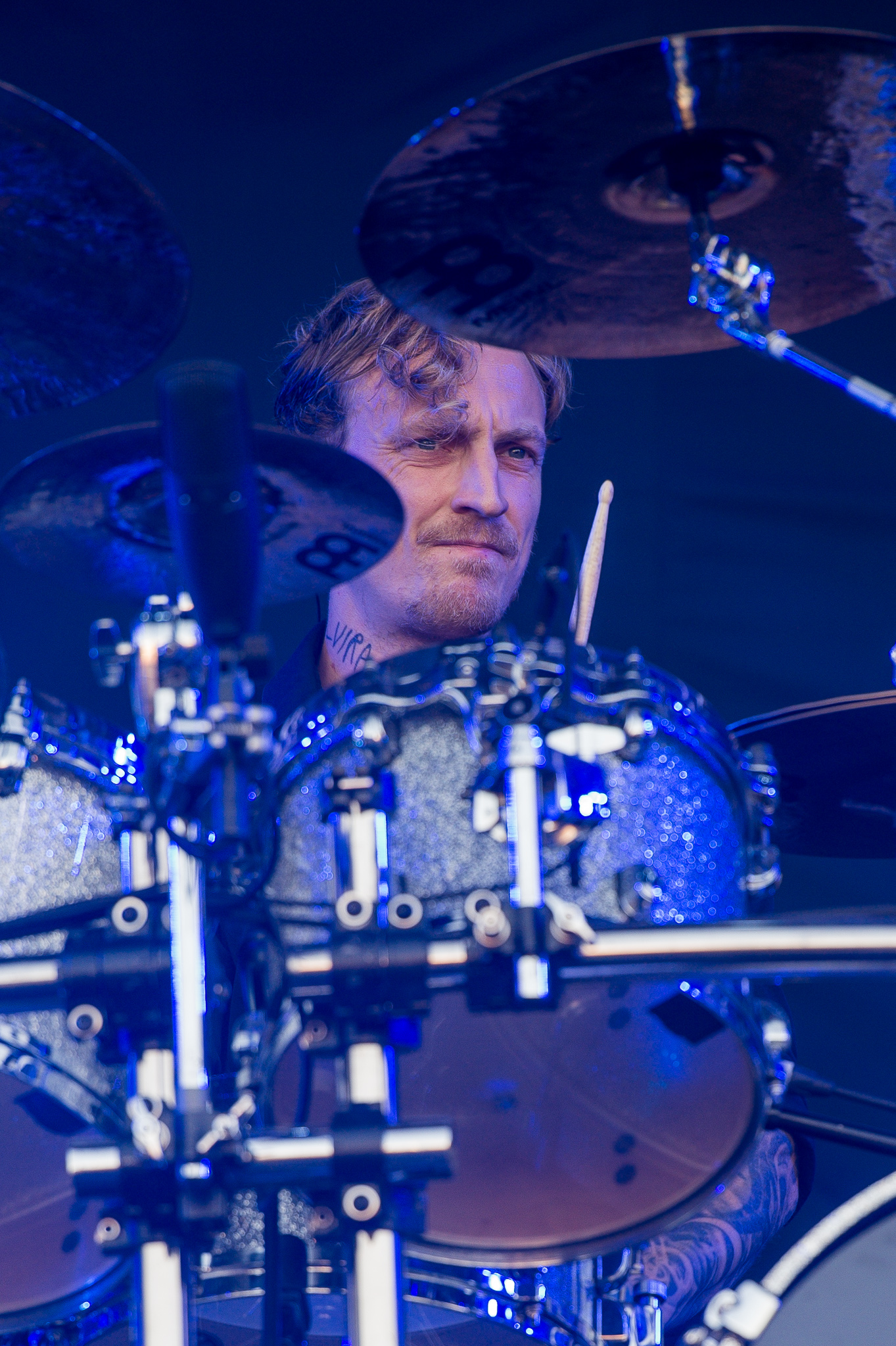 ARGO-Konzerte,Beck's Park Stage,Daniel Svensson,Festival,In Flames,Konzert,Livekonzert,Livemusik,Musik,RiP,Rock im Park 2015